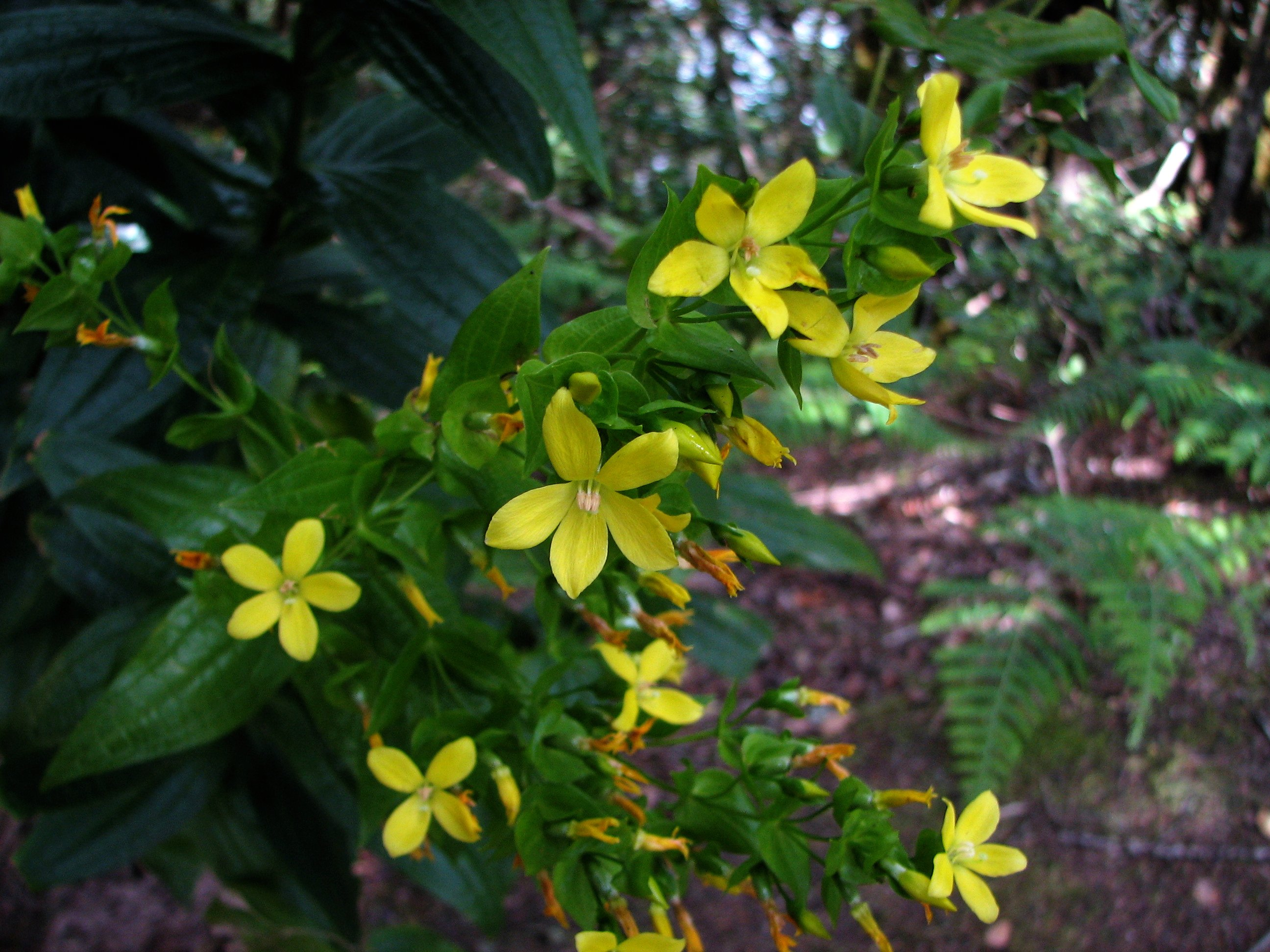 Reina Monte (Ixanthus viscosus). El Pijaral, Monte de Anaga, Tenerife.